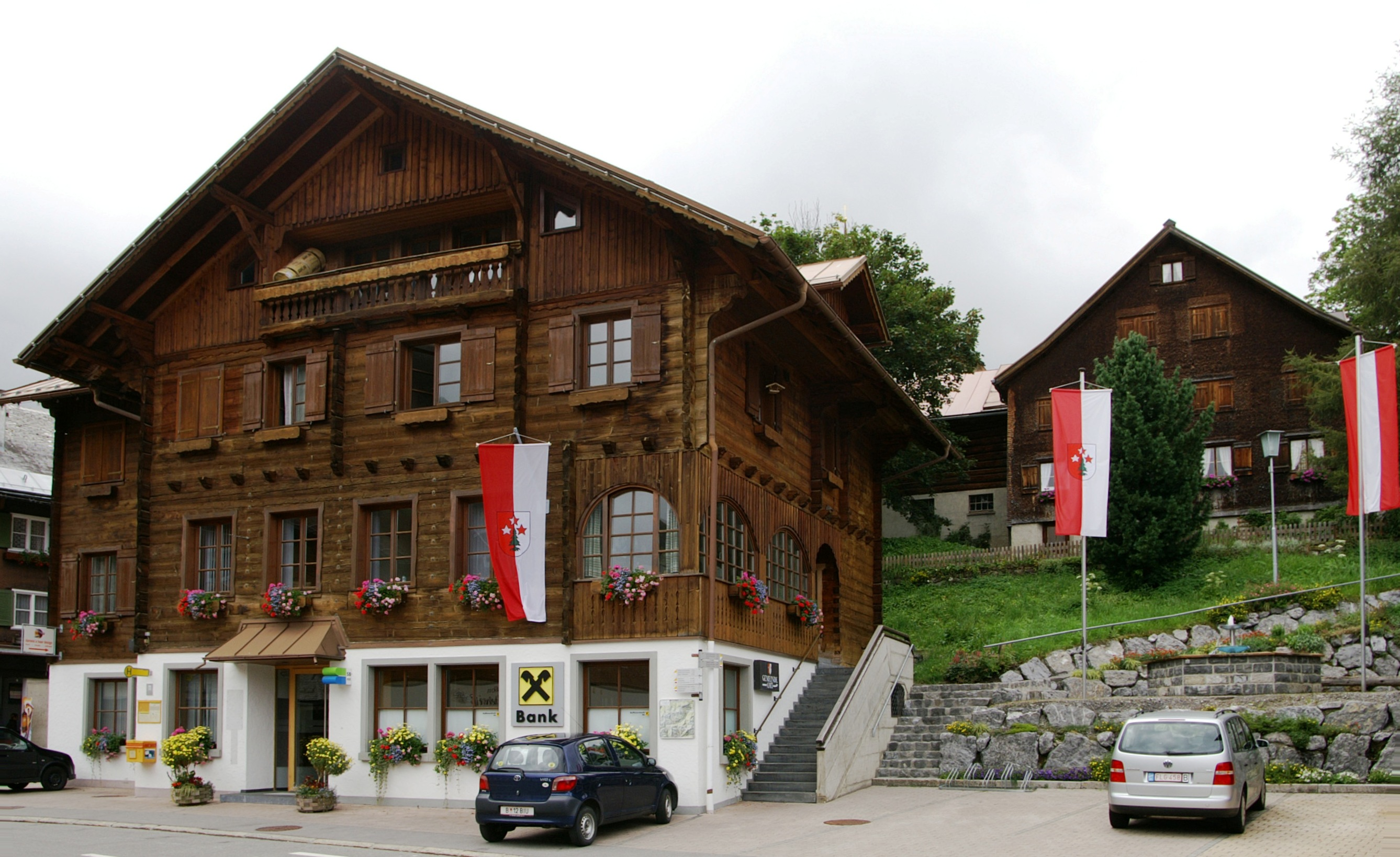 Ehemals Volksschule Nr. 136 in Damüls. *** 1921 Ursprünglich im Walserstil erbautes Schulhaus von Willibald Braun. In den 1970er Jahren unter wehementen Protesten abgerissen und nach Plänen von Braun wieder errichtet.